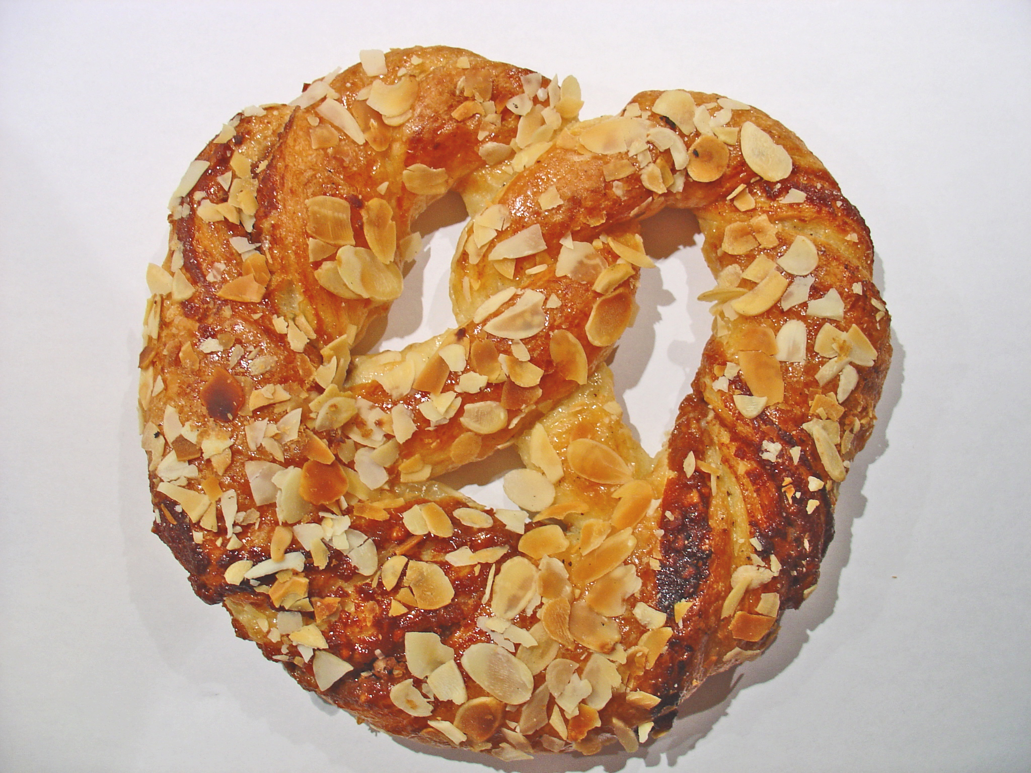 Gefëllte Bretzel.